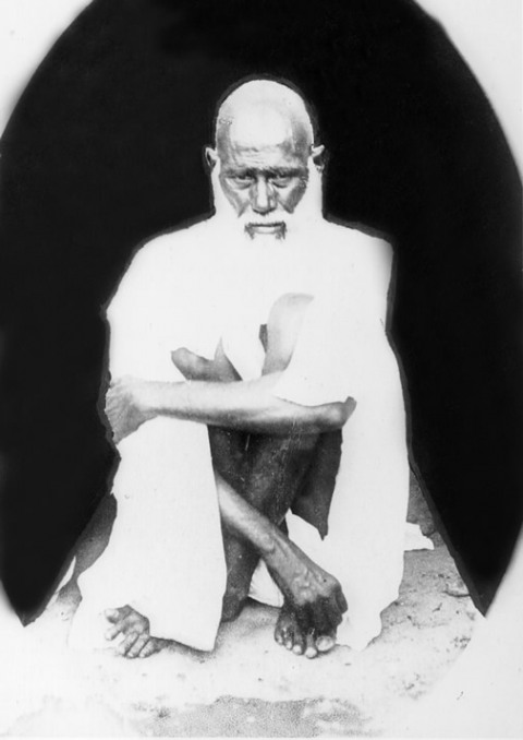 Tajuddin Baba